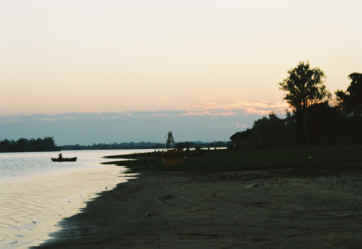 Fotografía del río Parana al paso de Ayolas.